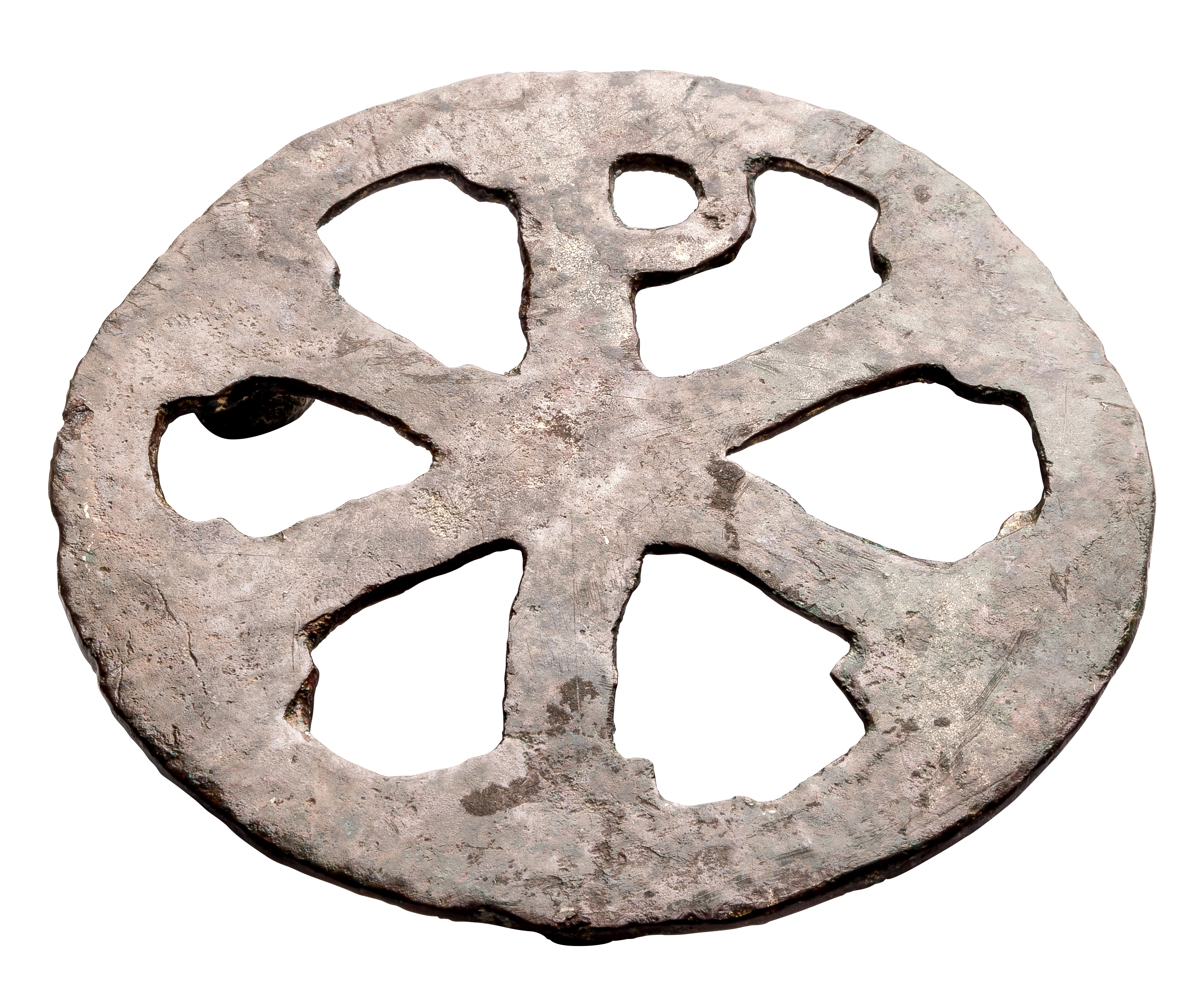 Christogramvormig beslag in brons, 375 tot 450 NC, vindplaats: Neerharen/Rekem, 1982, Germaanse nederzetting, afvalkuil 7, collectie Gallo-Romeins Museum Tongeren, 81.NE.023